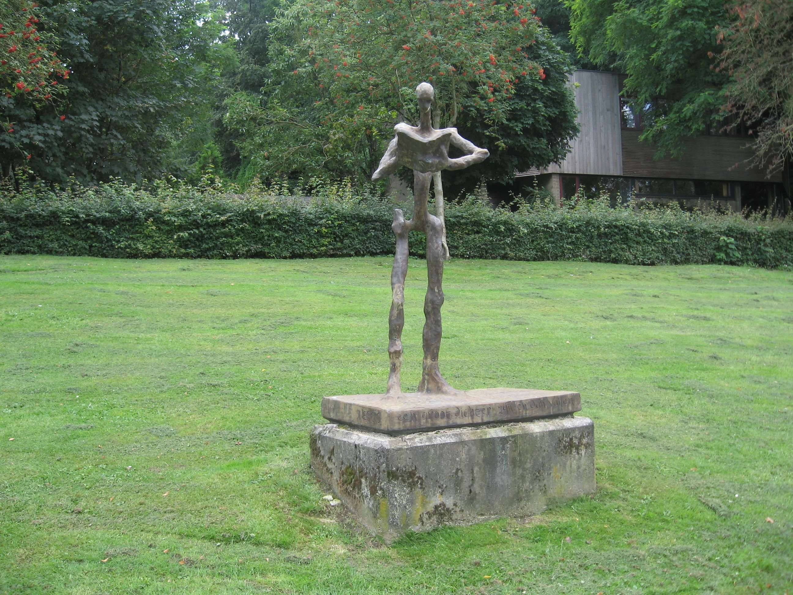 Beeld "De lezende Nescio" (1991) van Ronald Tolman - Een groot dichter zijn en dan vallen